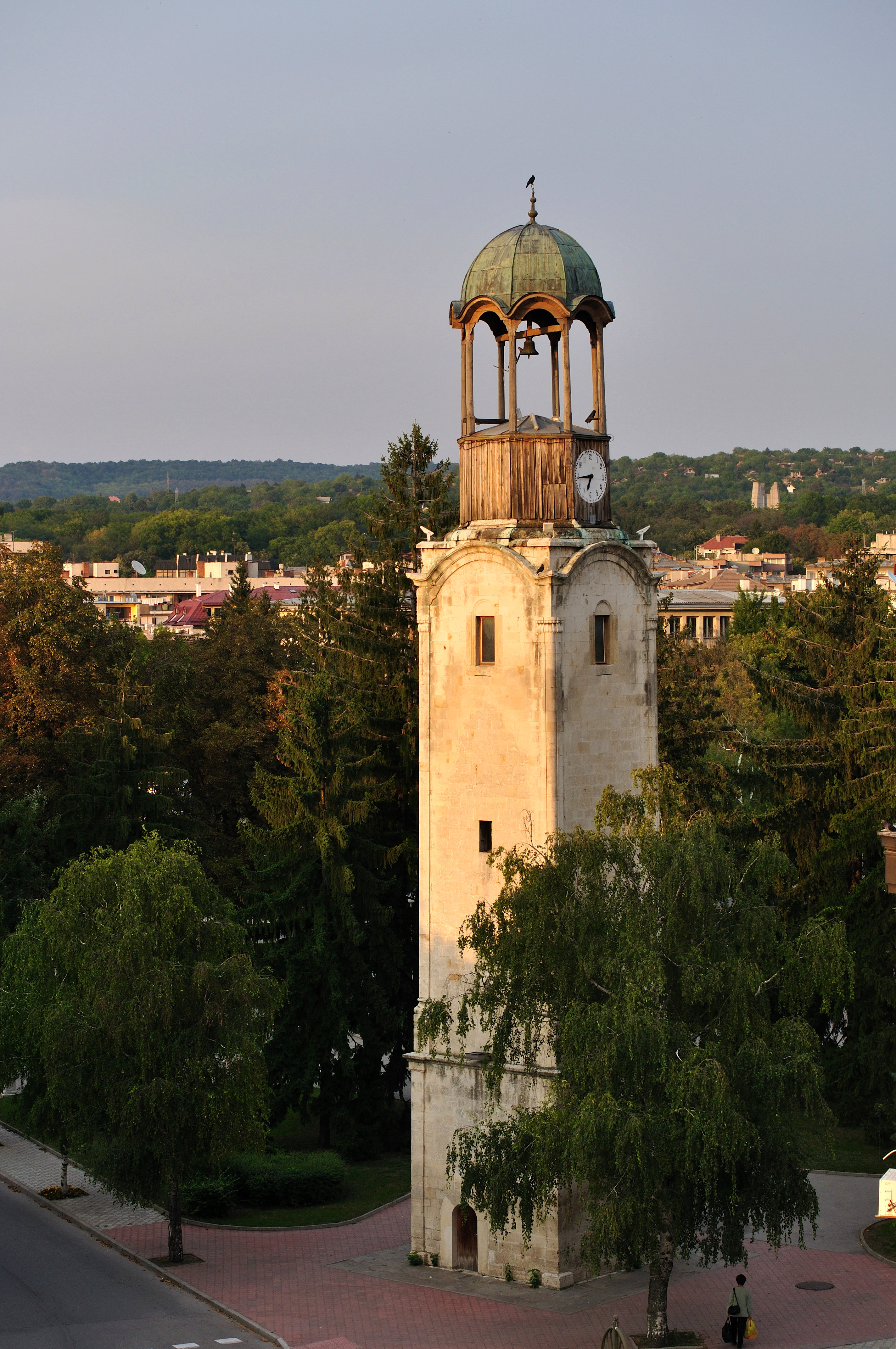 Символът на Разград е построен през 1864 г. и все още работи! Половин час се отбелязва с 1 удар, а на кръглите часове удря толкова пъти, колкото е часът. The symbol of Razgrad was built in 1864 and is still ticking! One beat marks half an hour and every hour it beats as many times as is the hour.